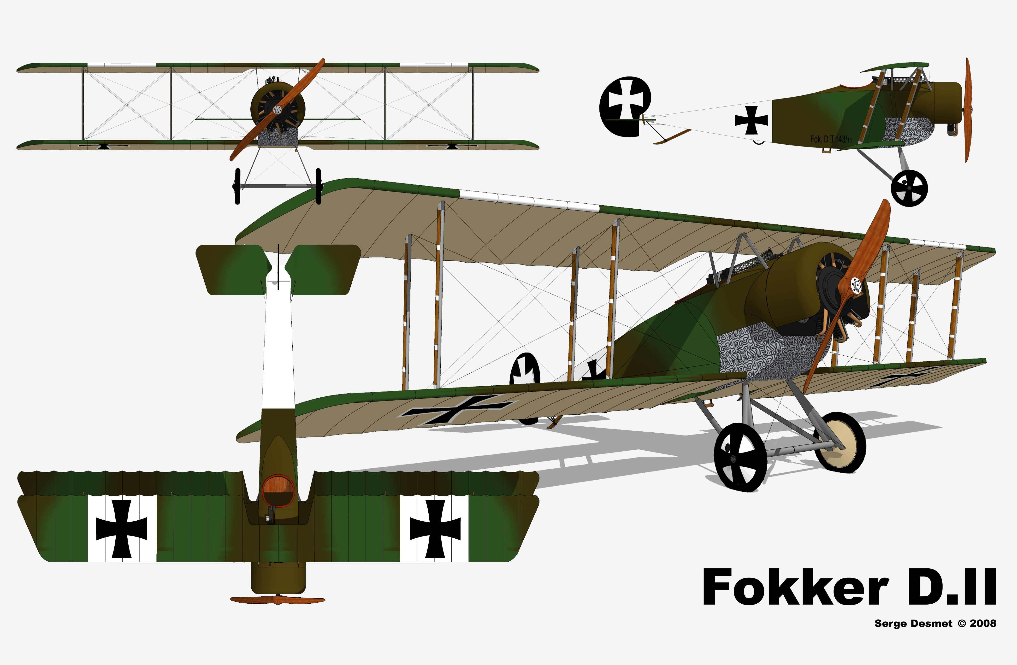 plan 3 vues du Fokker D. II (1916)